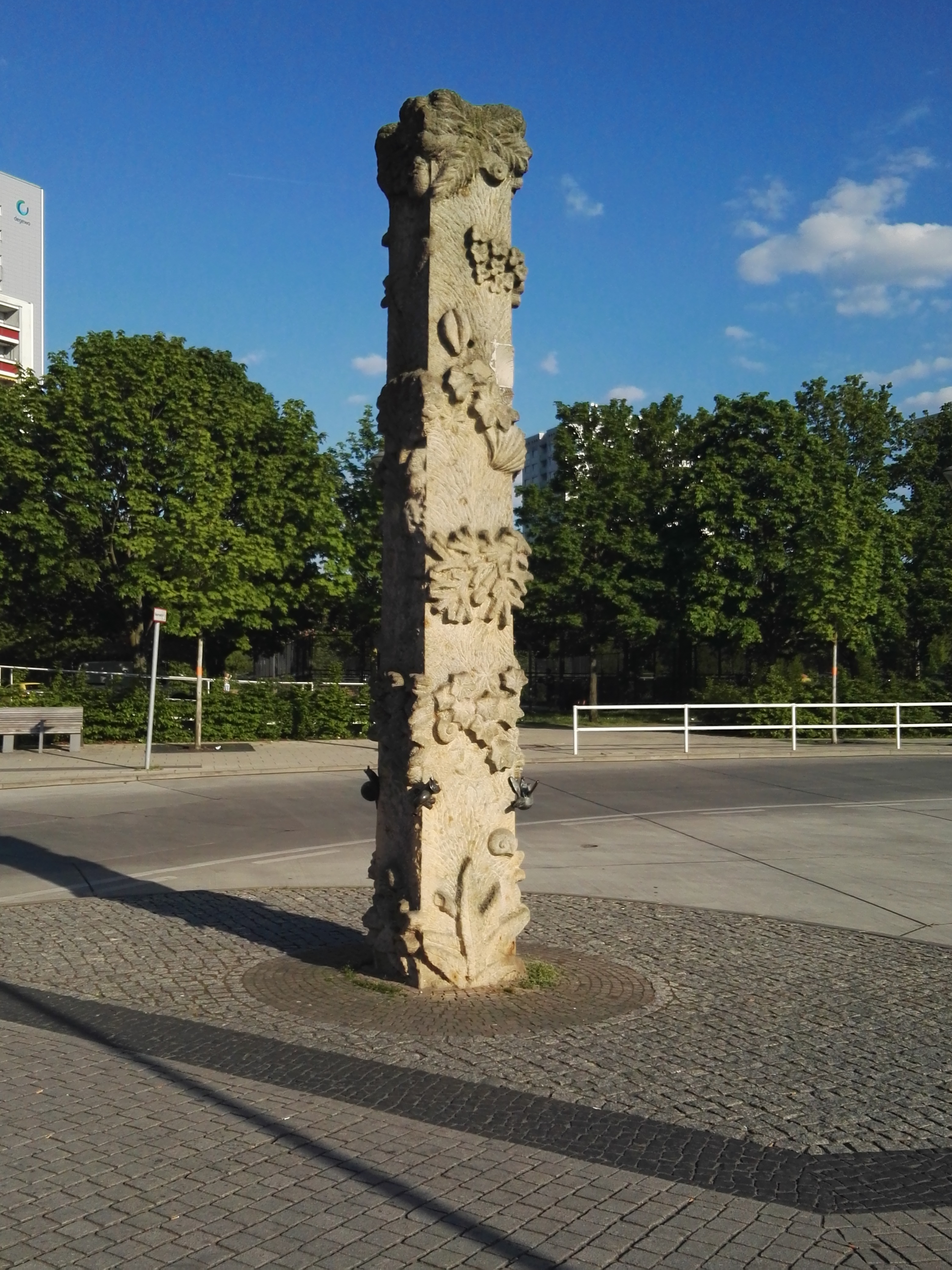 Sandsteinstele auf der Busbahnhof Marzahn vor dem Eastgate